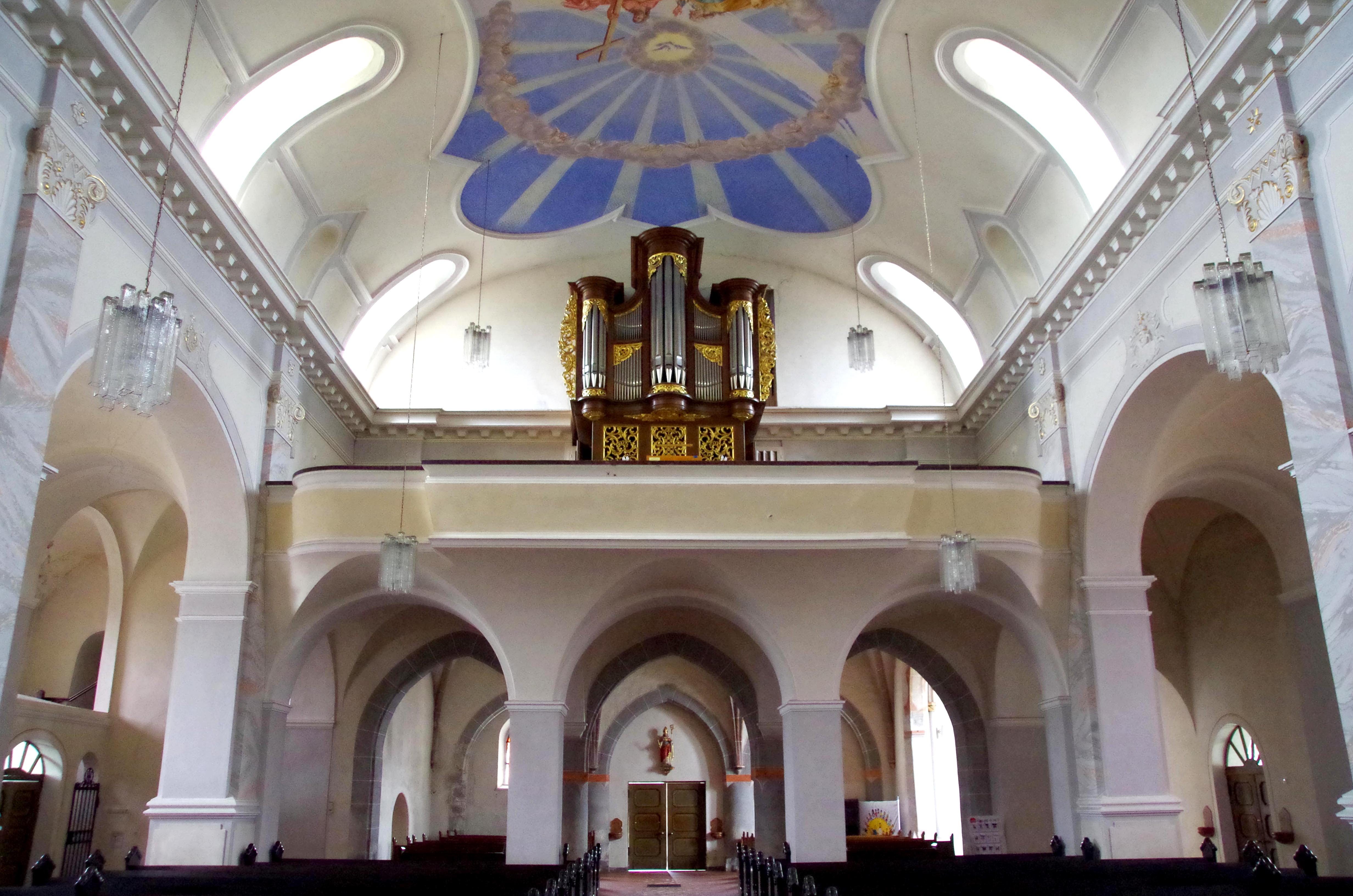 Sankt Mariä-Himmelfahrt (Bleialf), historisches Orgelgehäuse von 1860